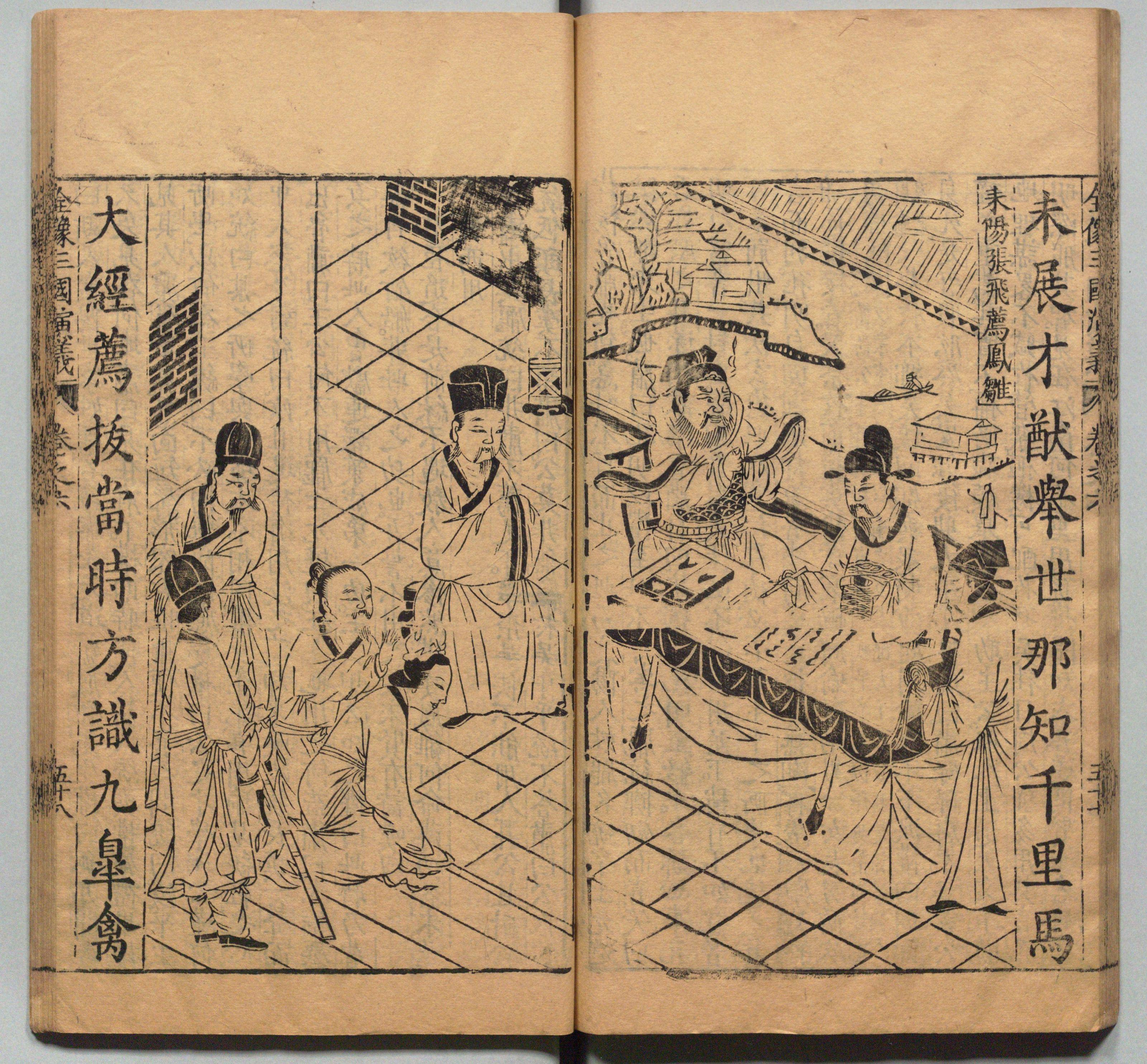 新刊校正古本大字音释三国志通俗演义 明万历十九年书林周曰校刊本